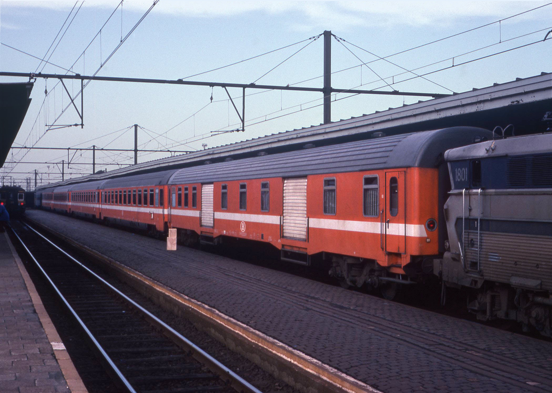 Een IC Keulen - Oostende met Eurofina rijtuigen en getrokken door een loc 18